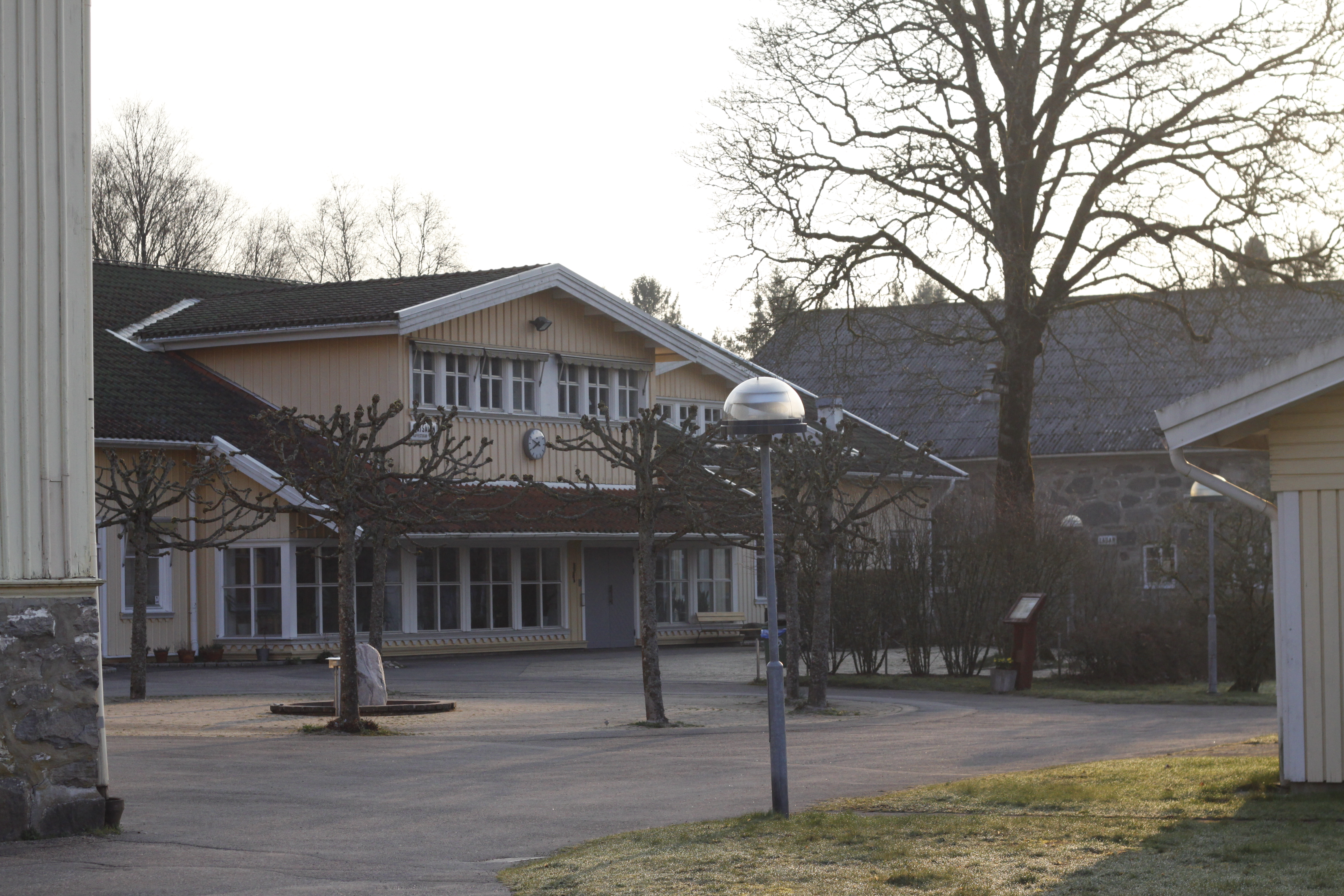 Matsalen på Viskadalens Folkhögskola 2019. Ett stort gult hus av trä med vita knutar. En tidig morgon i april.